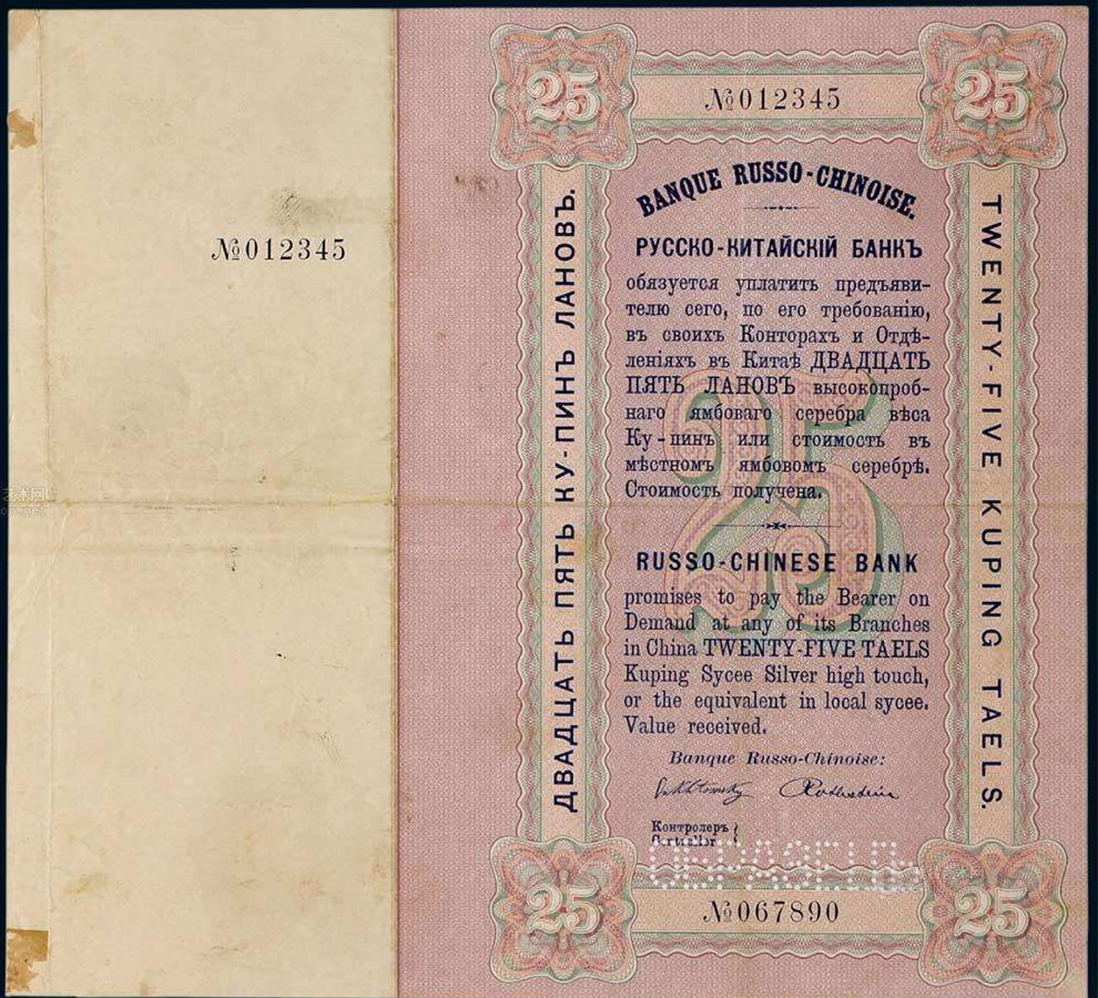 华俄道胜银行库平足色银25两票